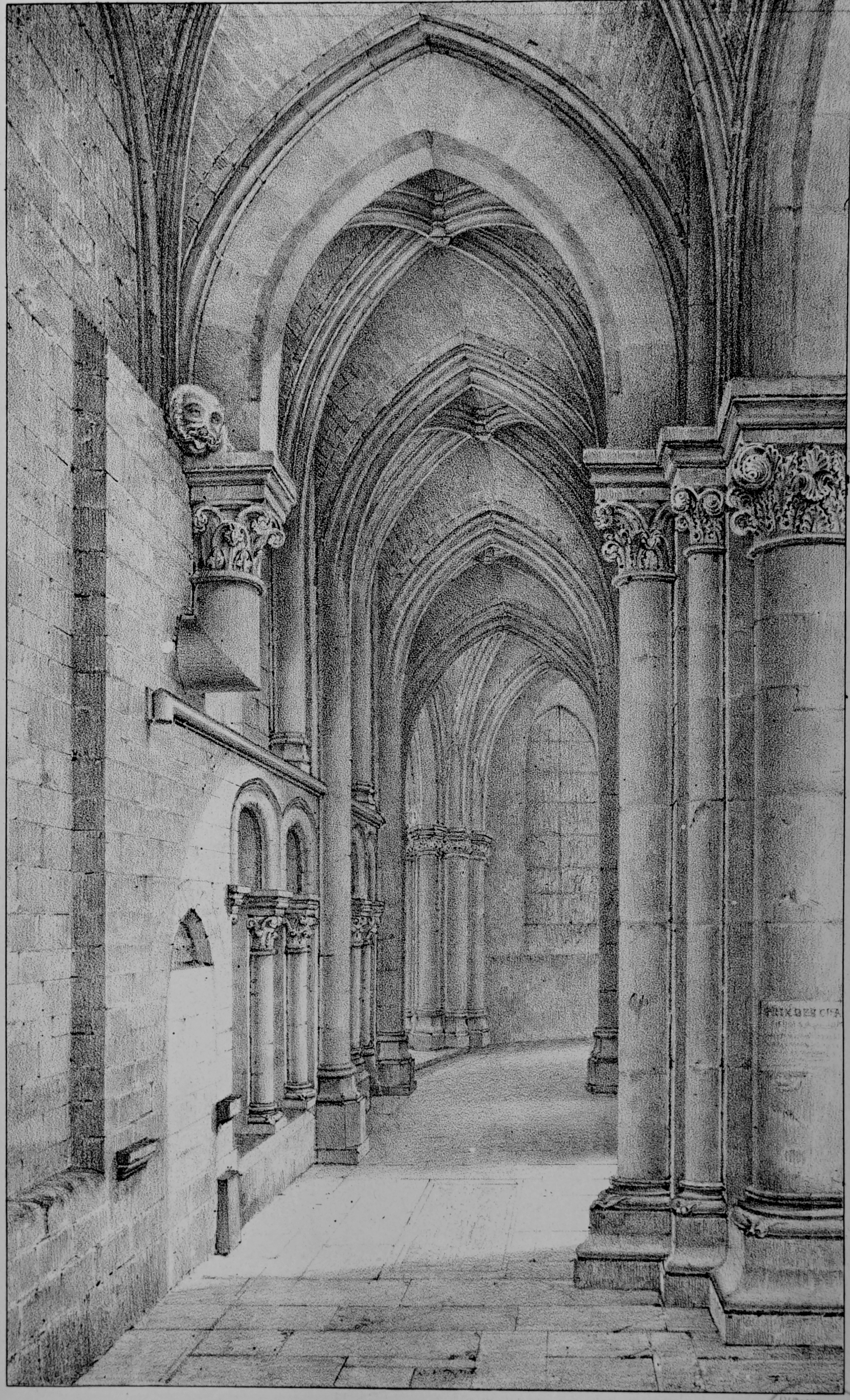 vue de l'église.